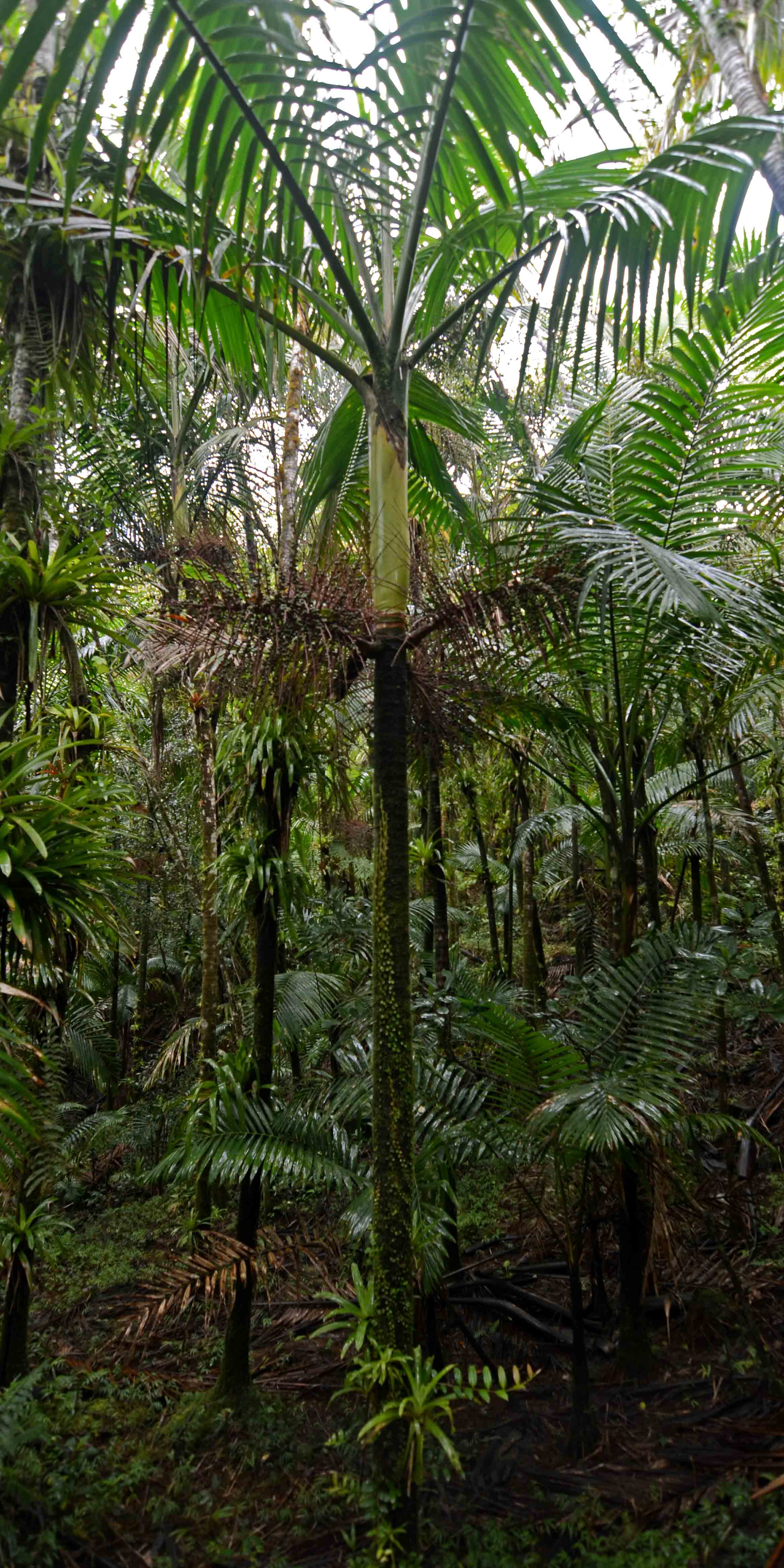 Arecaceae: Gaussia attenuata El Yunque, Puerto Rico